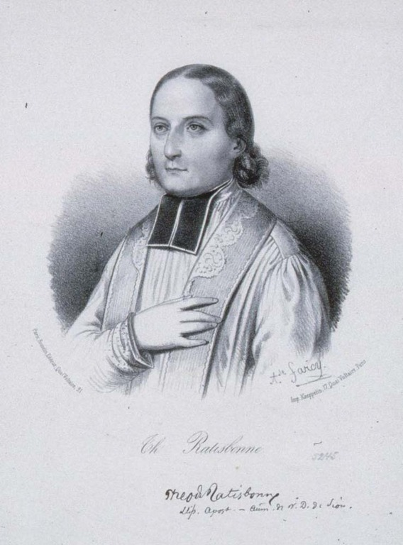 Th. Ratisbonne